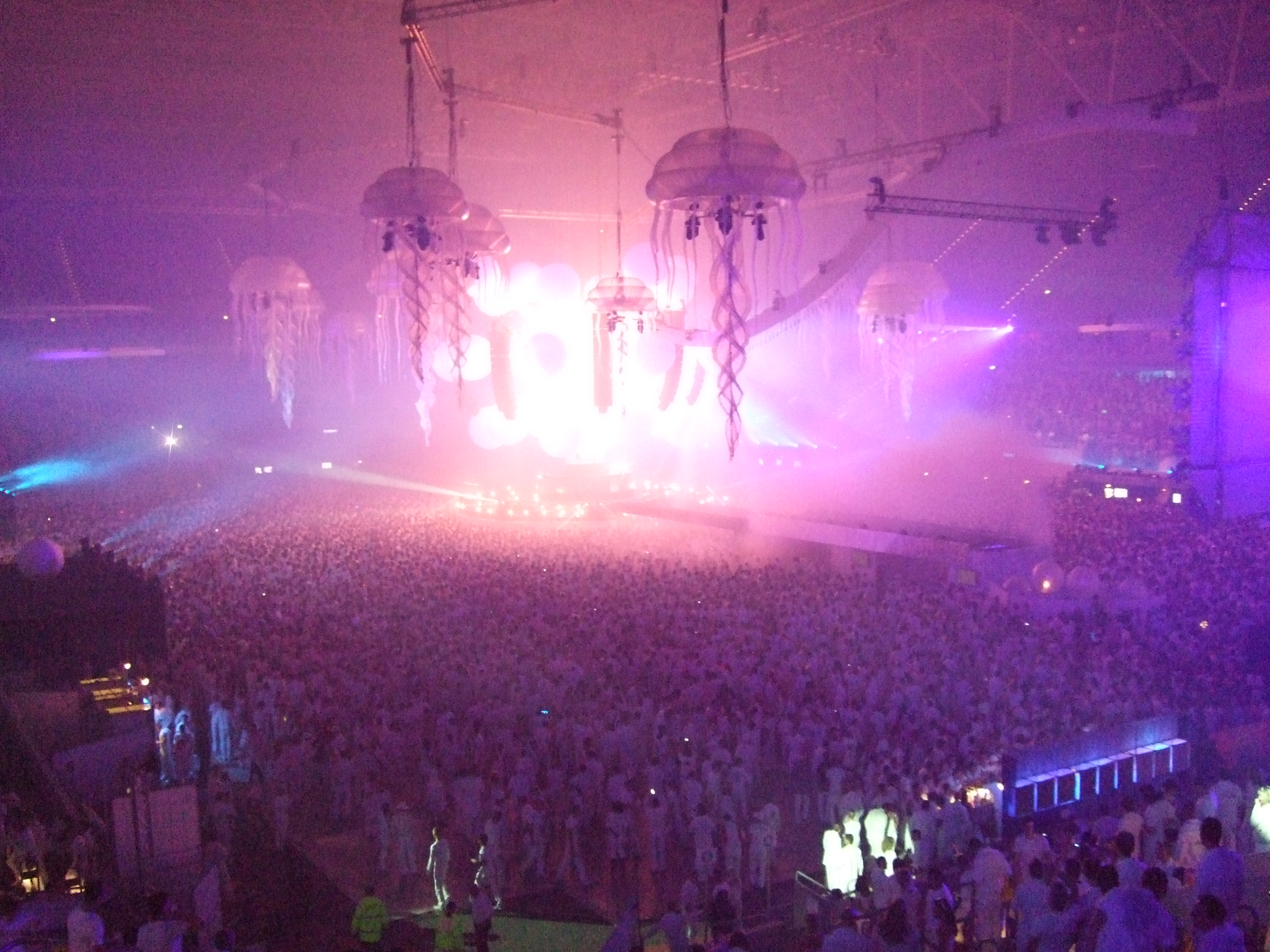 Blick über die gesamte Veranstaltung.